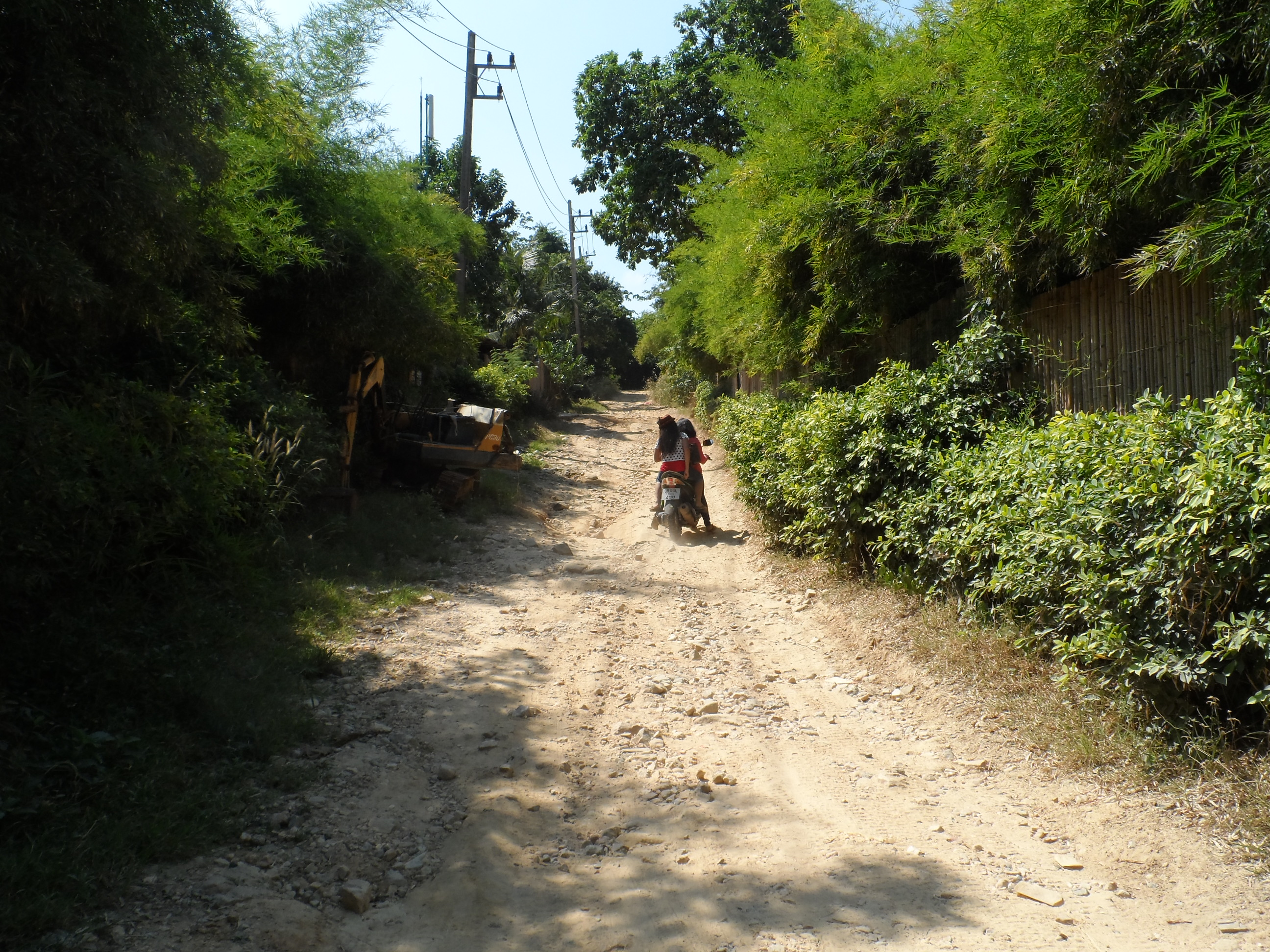 ถนนบนเกาะเสม็ดทอดยาวจากเหนือถึงใต้ ช่วงกลางถึงท้ายเกาะถนนสายนี้จะเป็นพื้นผิวลูกรัง